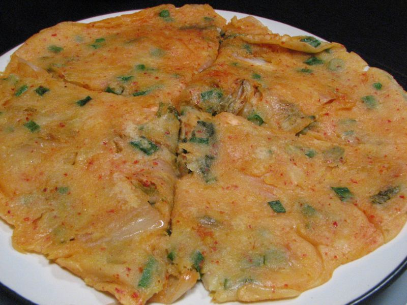 Kimchijeon, kimchi pancake in Korean cuisine